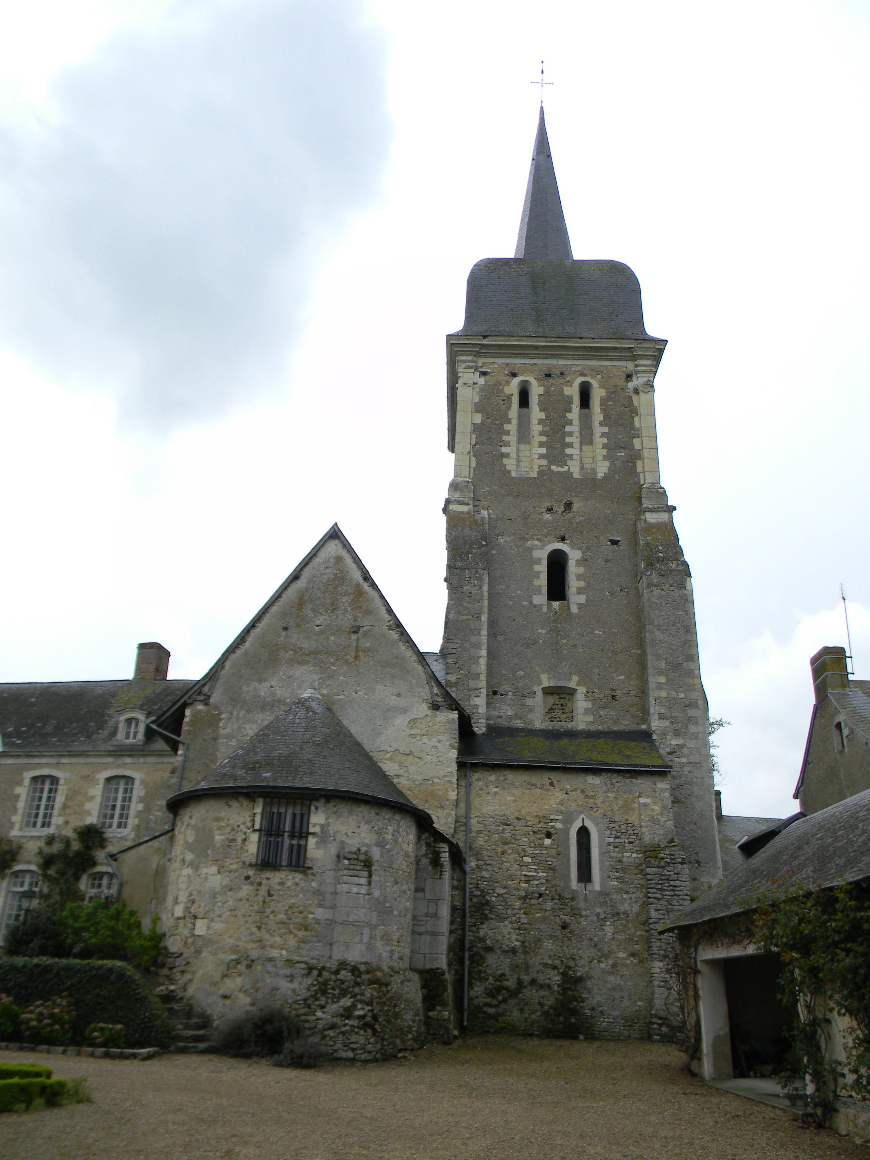 Le clocher de l'église Notre Dame de Brissarthe (Arrière)